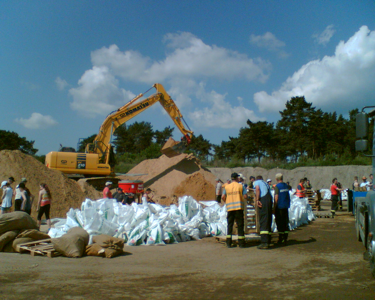 Einsatzleiter koordiniert Aktivitäten von freiwilligen Helfern: Sand bereitstellen, Sandsäcke füllen, Holzpaletten transportieren. Juni 2013.